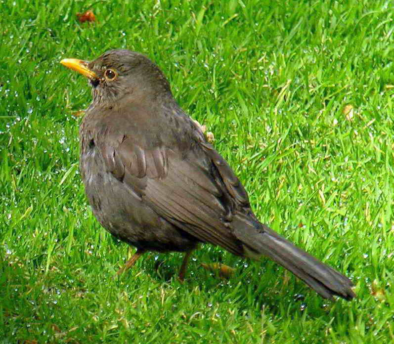 Bastabales - Galicia - Spain Foto tirada cunha Nikon E8800